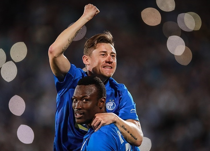 مامه‌بابا تیام و سرور جپاروف در لباس استقلال